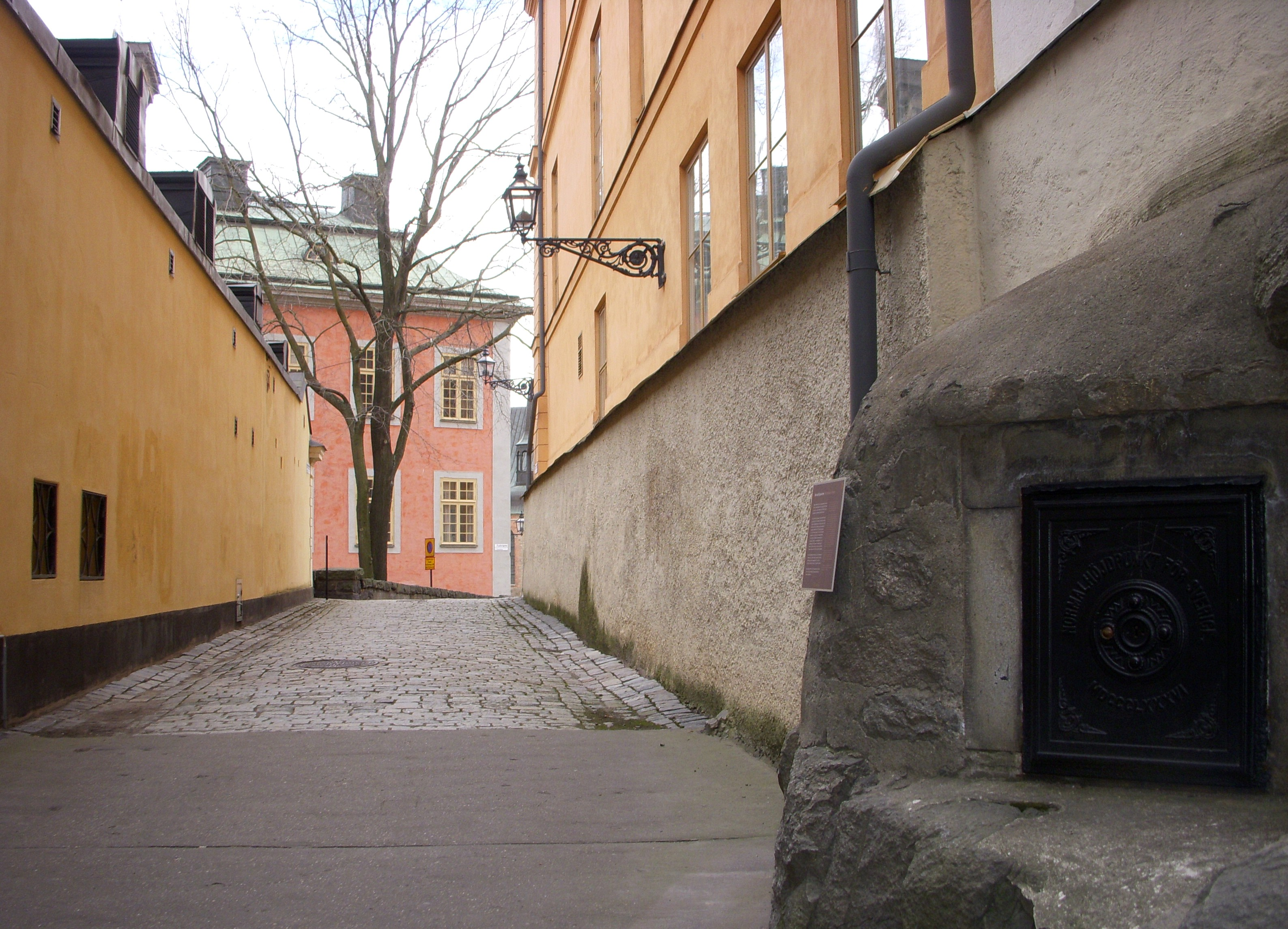 Schering Rosenhanes gränd på Riddarholmen i Stockholm. Till höger syns järnluckan som döljer skalan för Rikets nollpunkt (RH 00)